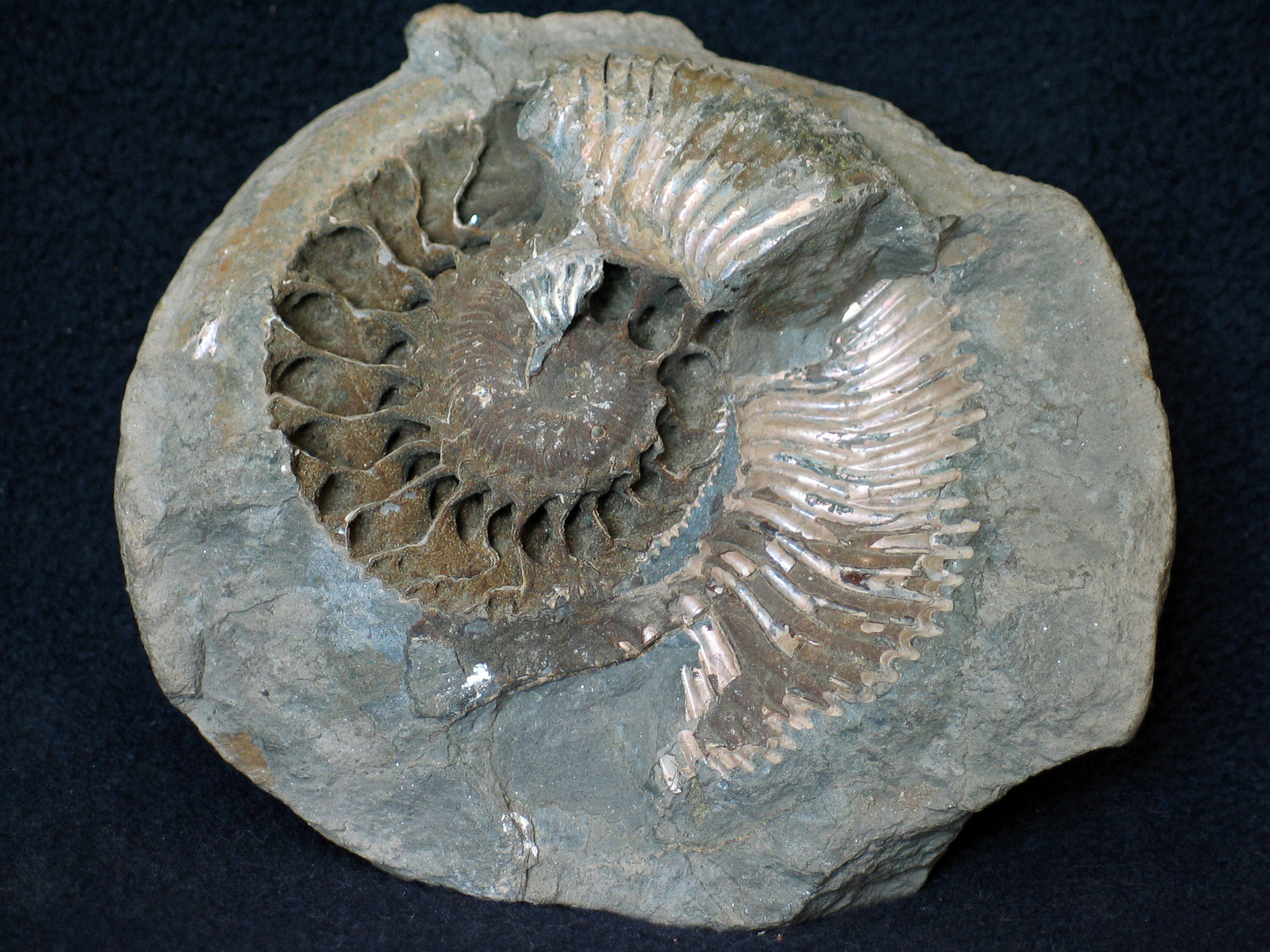 Amonit - Kosmoceras, Jura, kelowej - Łuków.